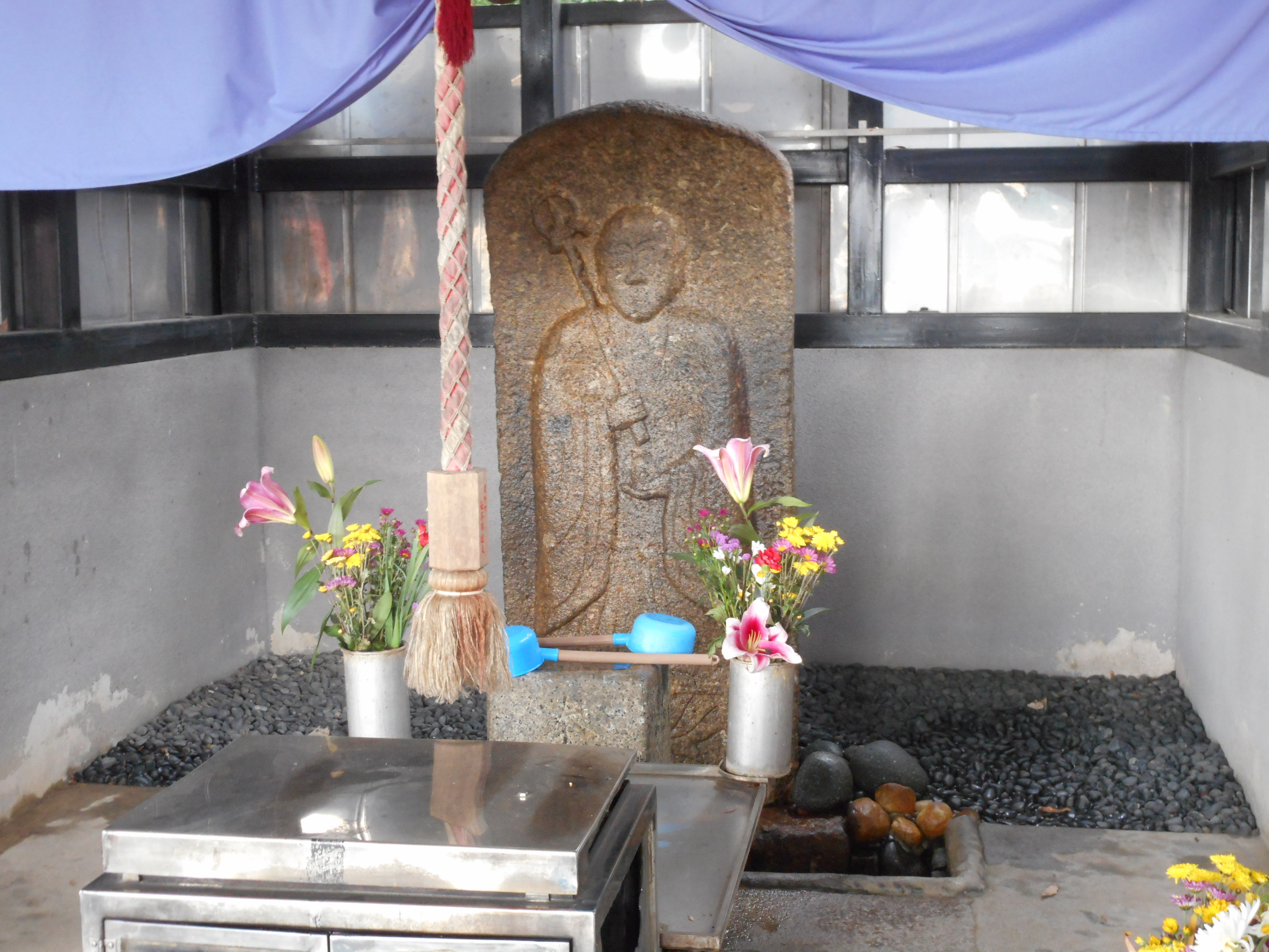 この地蔵は１６４７年に作られました。右側に作製年が彫られています。２０１９．２．２撮影